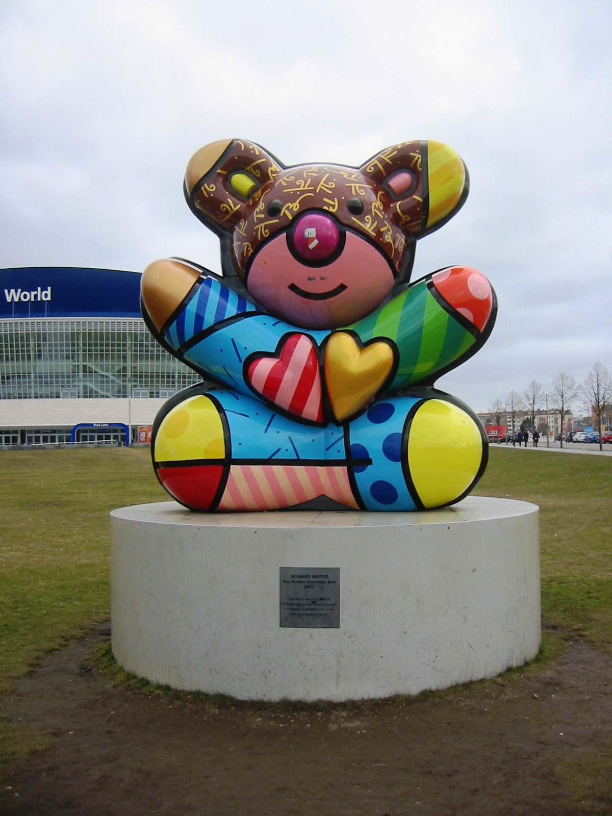 Vorderseite des "Best Buddies Friendship" Bear von Romeo Britto in der Mühlenstraße in Berlin-Friedrichshain vor der O2-World